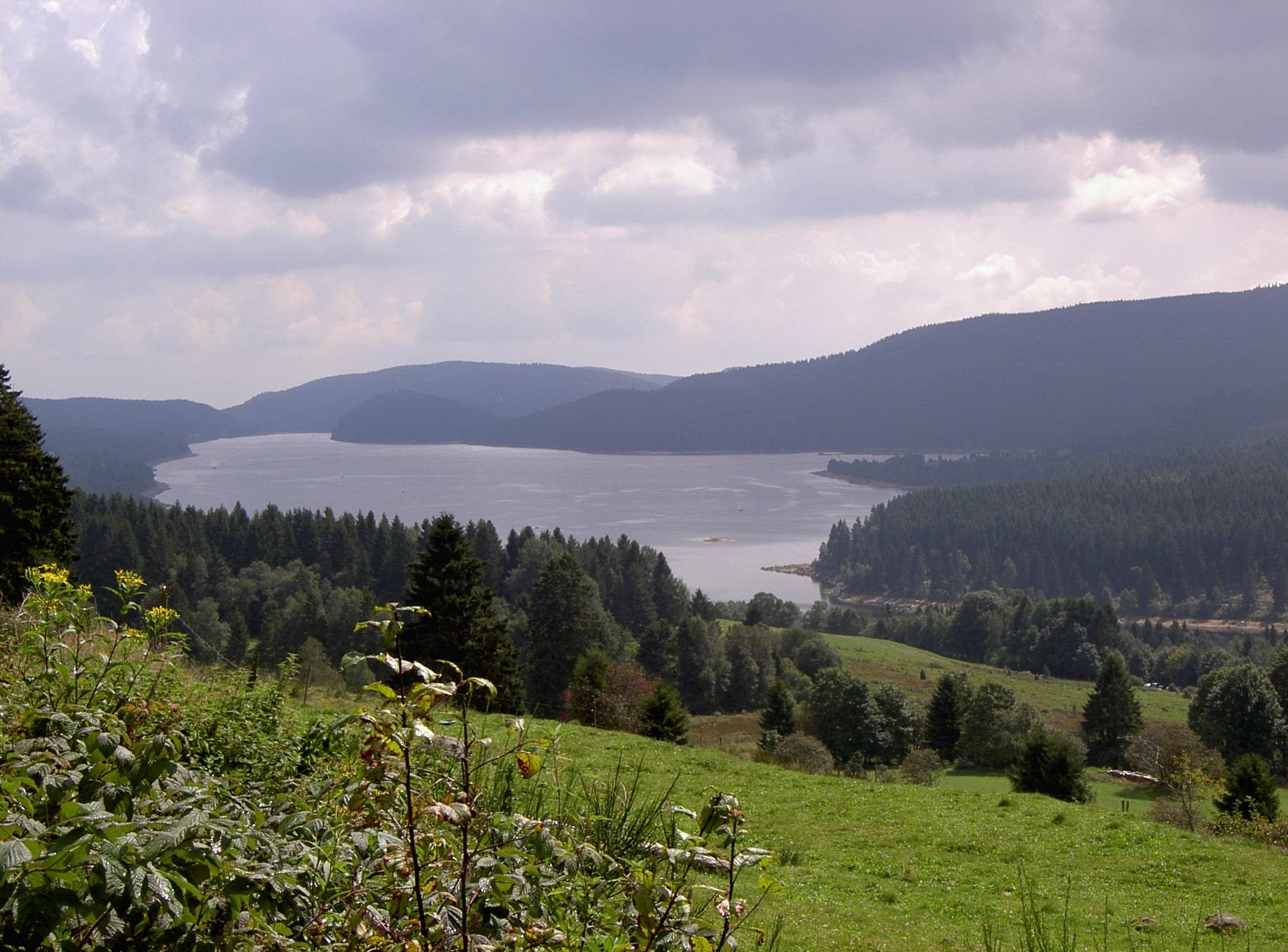 Schluchsee seen from Aha